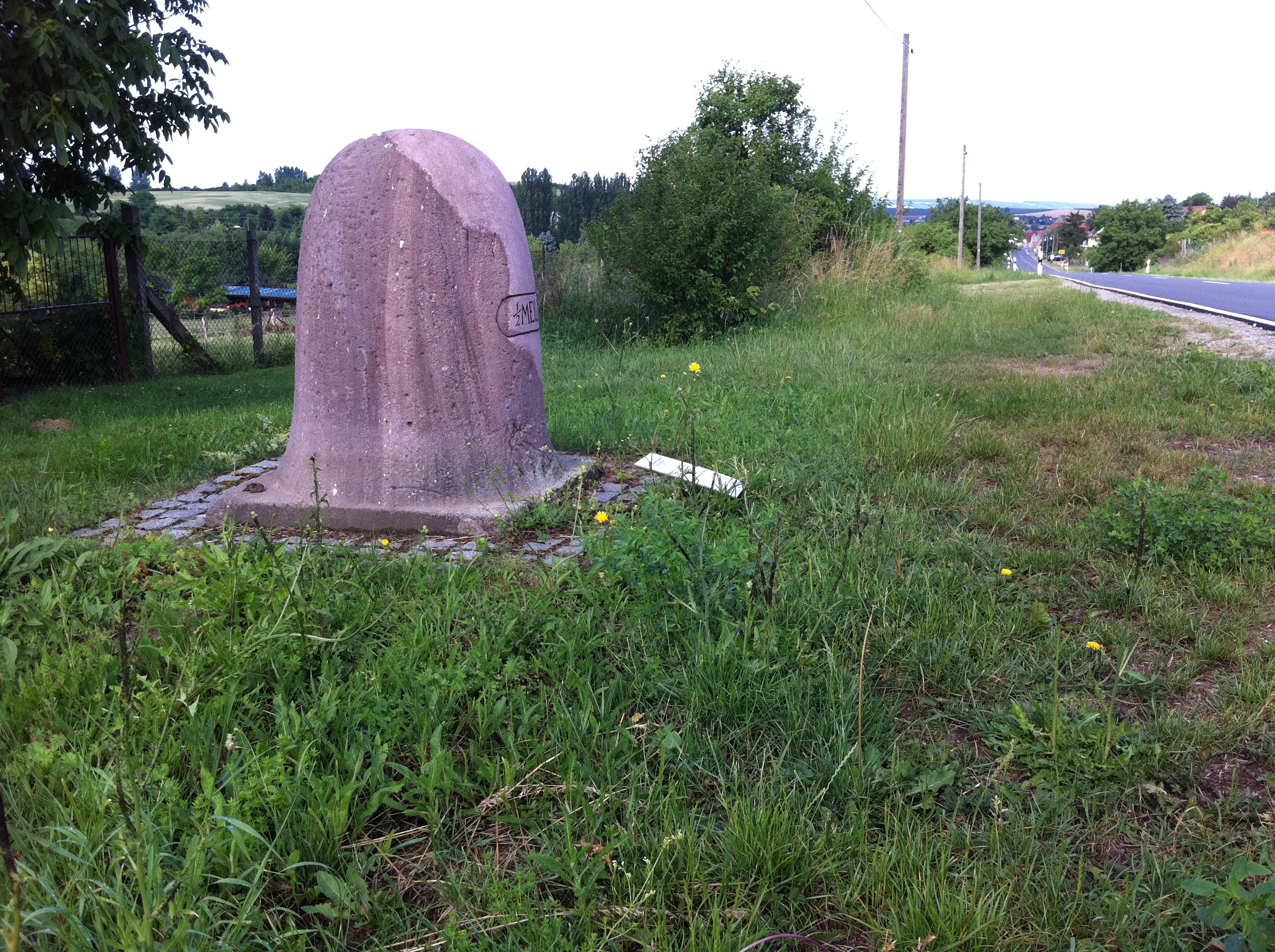 Preußischer Halbmeilenstein an der Straße von Langenbogen nach Seeburg (heute L 2080) am Ortsrand von Seeburg. Früher verlief hier die Kunststraße von Langenbogen über Eisleben und Sangerghausen nach Nordhausen.